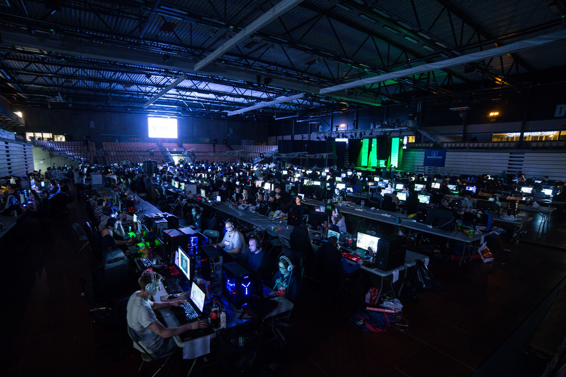 Hovedhallen under HordaLAN 2016